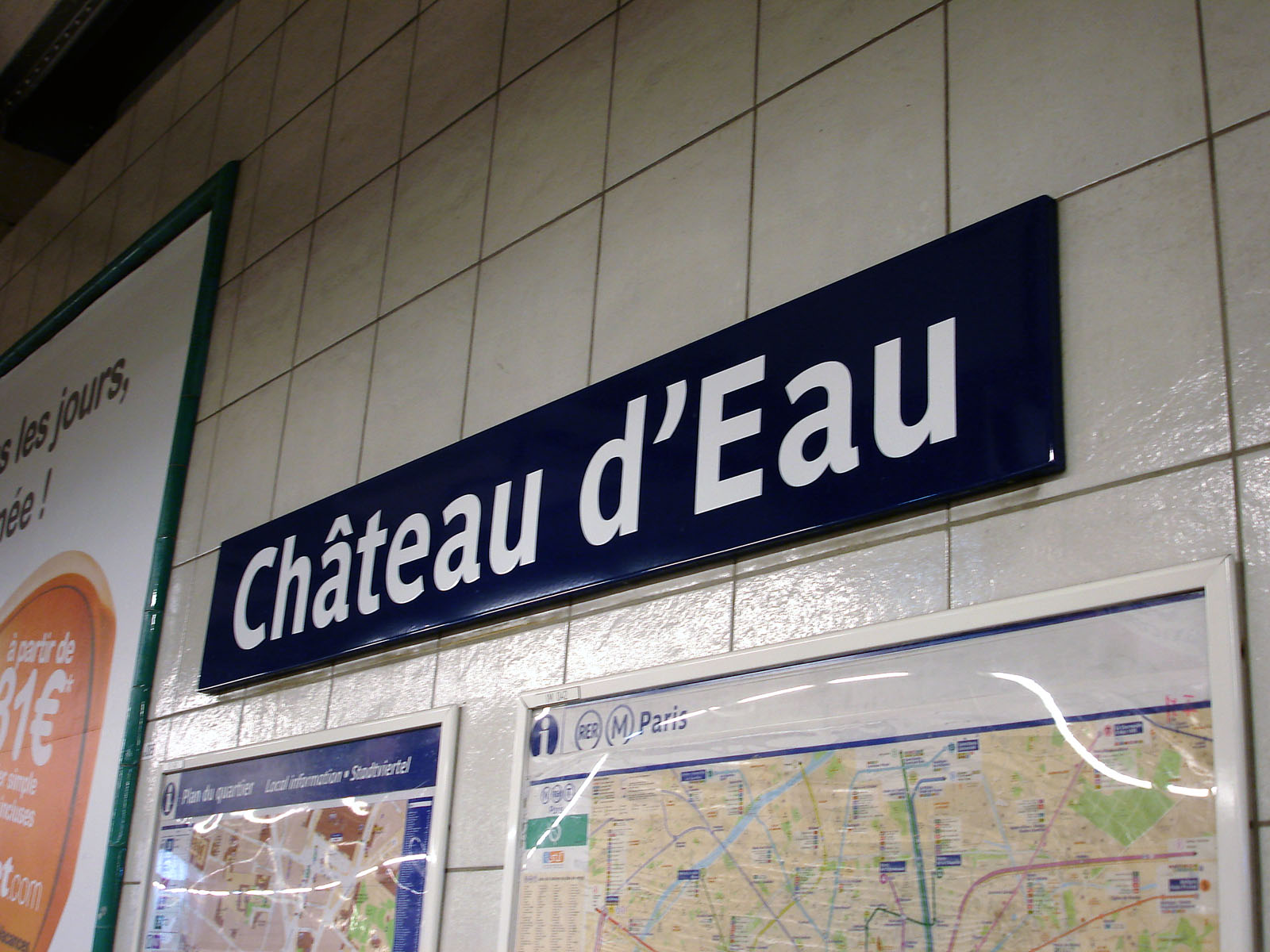 Panneau de la station Château d'Eau de la ligne 4 du métro de Paris, France